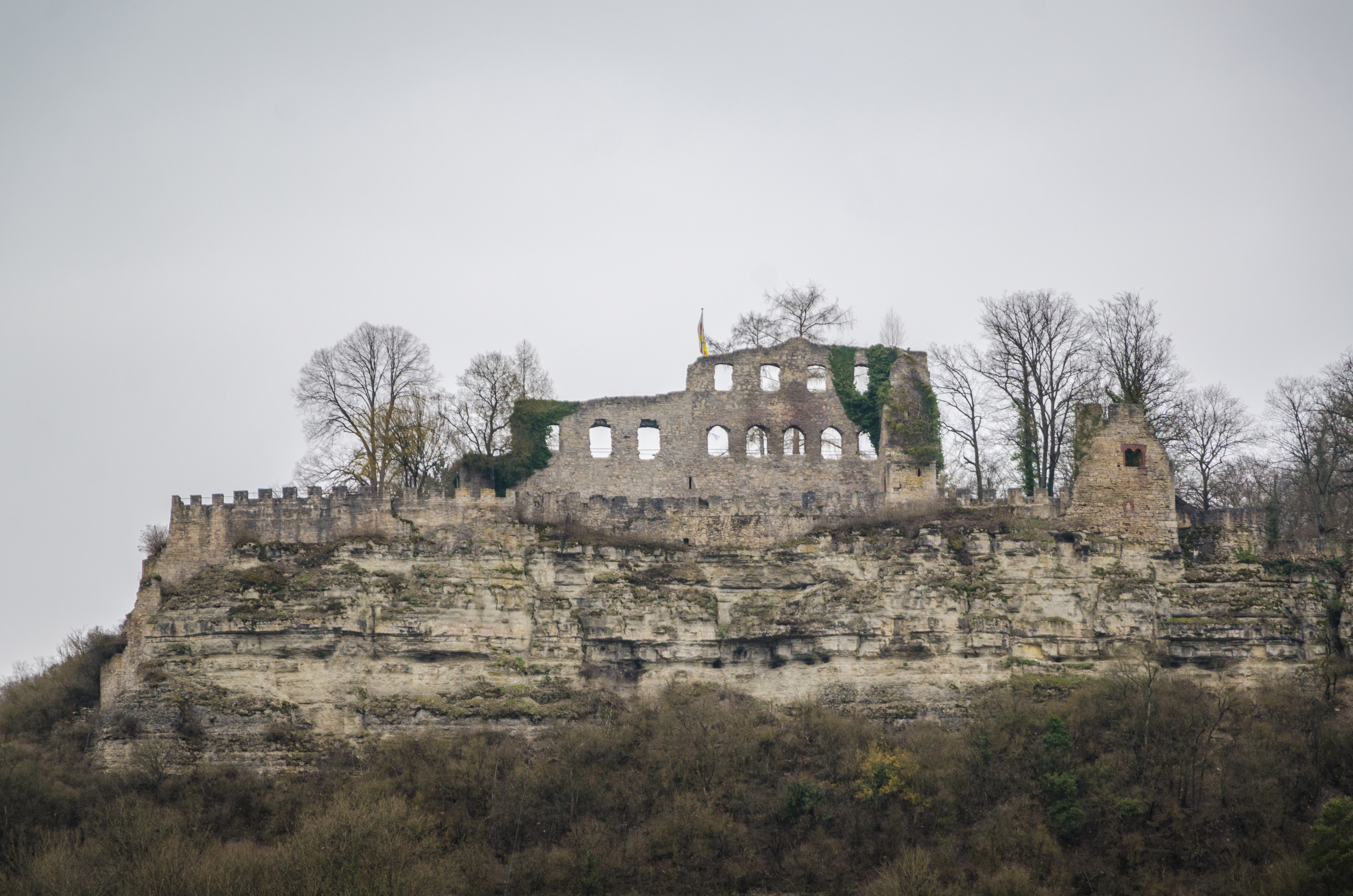 Karlstadt, Karlsburg